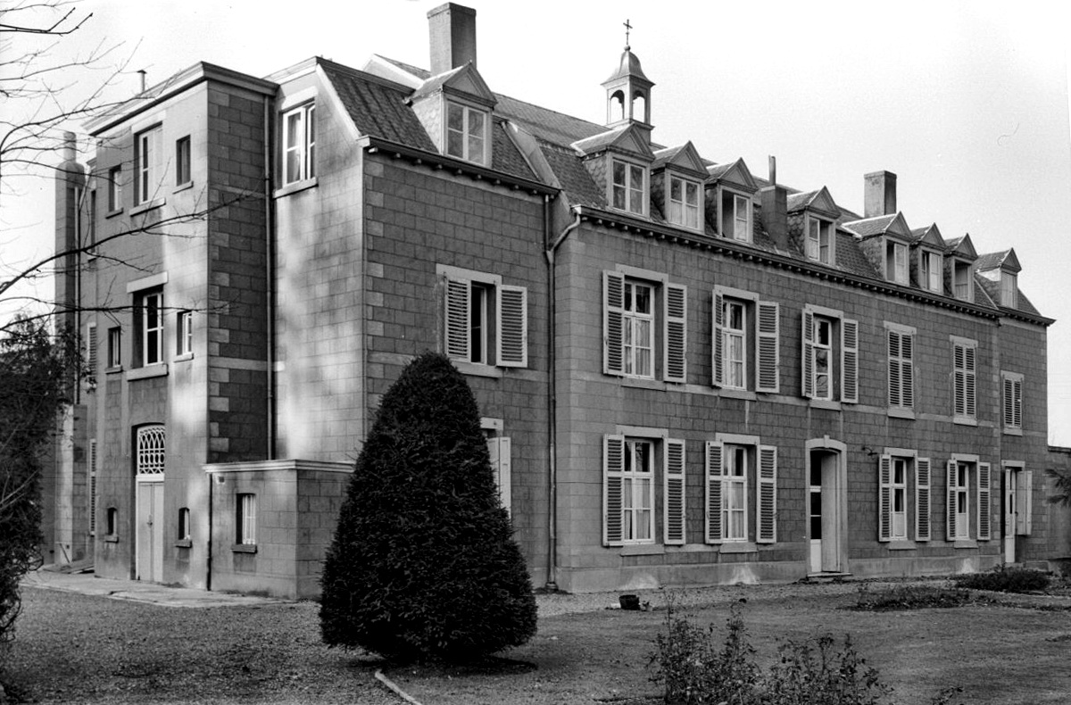 Klooster Opveld, zij- en achtergevel.